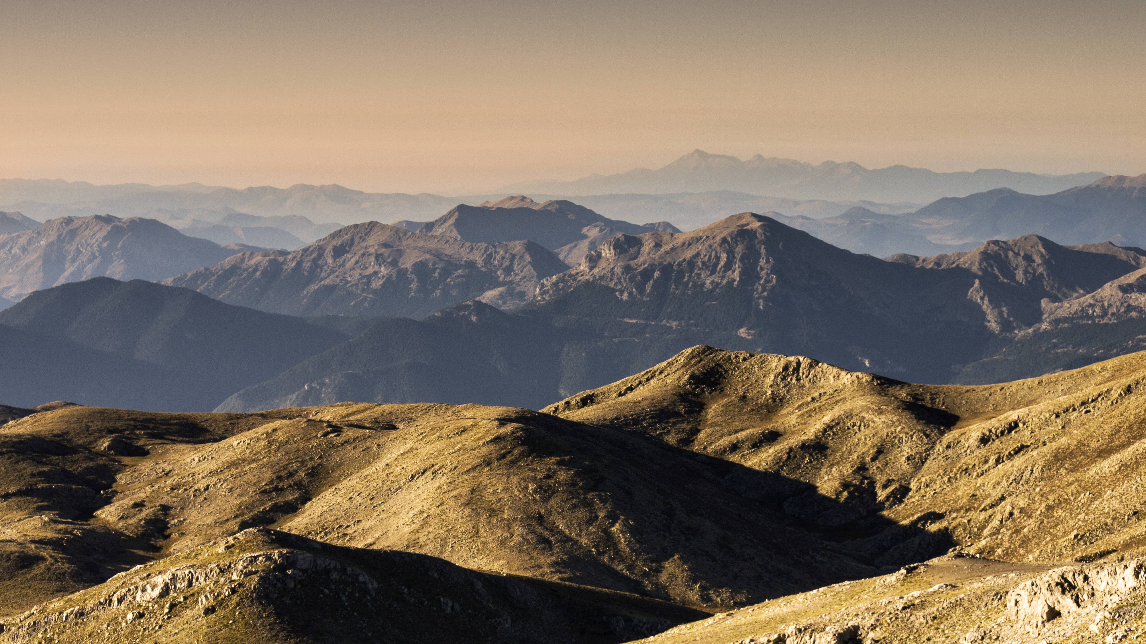 Από την κορυφή η θέα προς τα νότια. This is a photography of Natura 2000 protected area with ID GR2530001